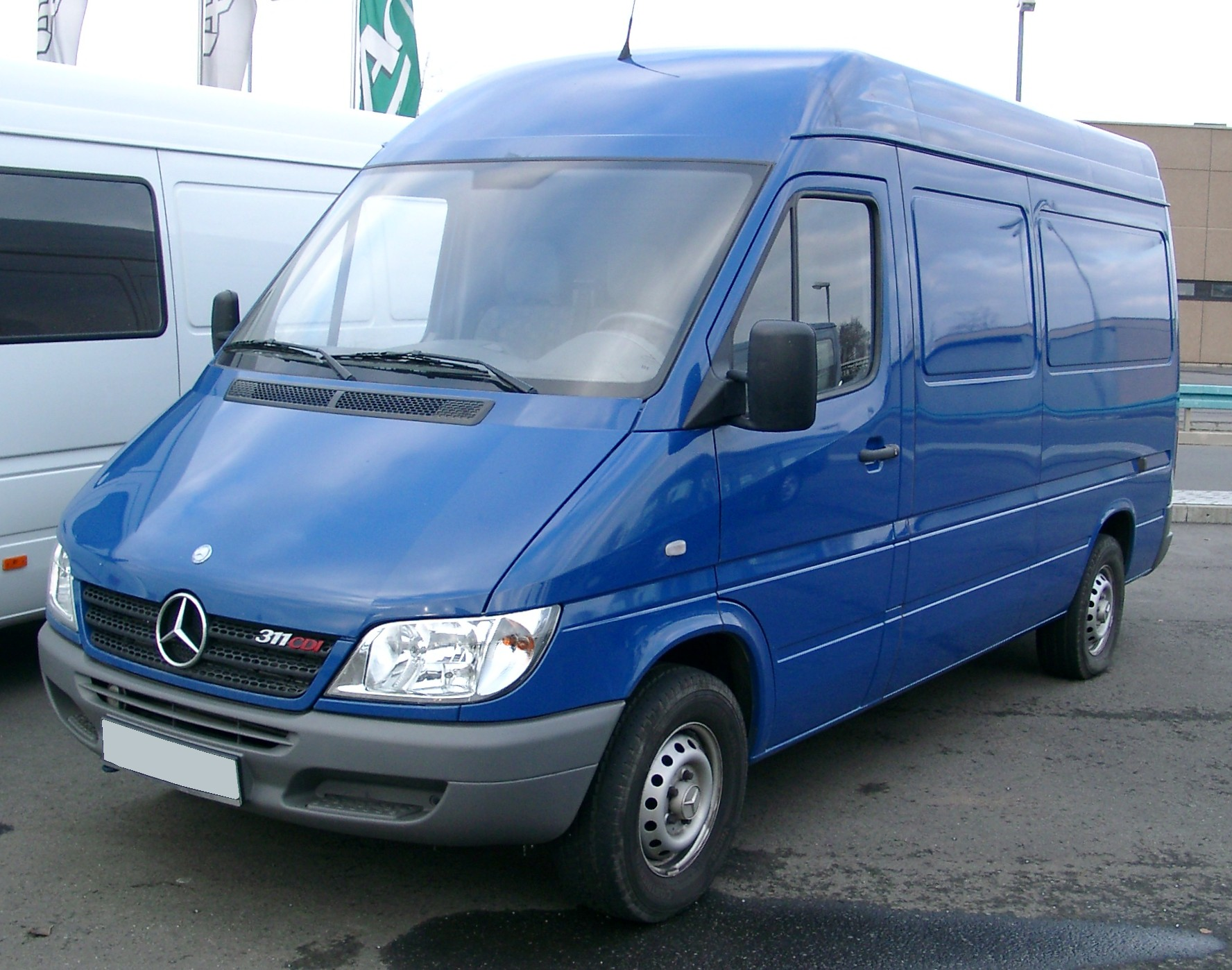 Mercedes-Benz Sprinter 311 CDI